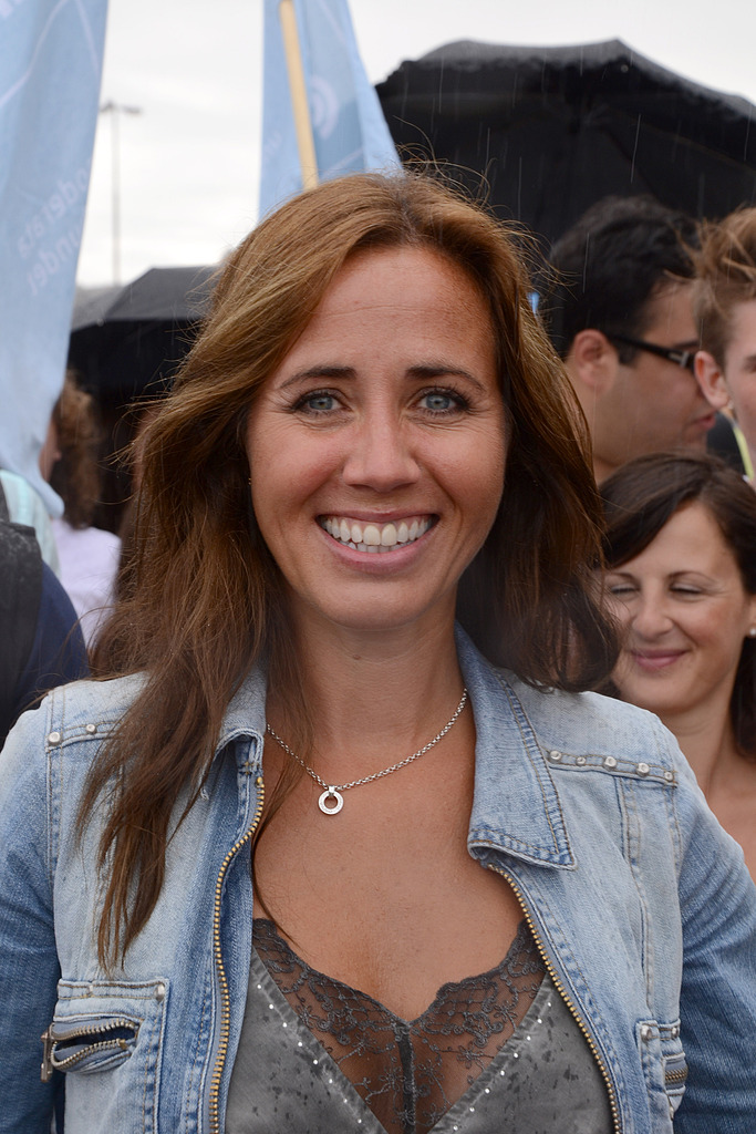 på Pride Stockholm